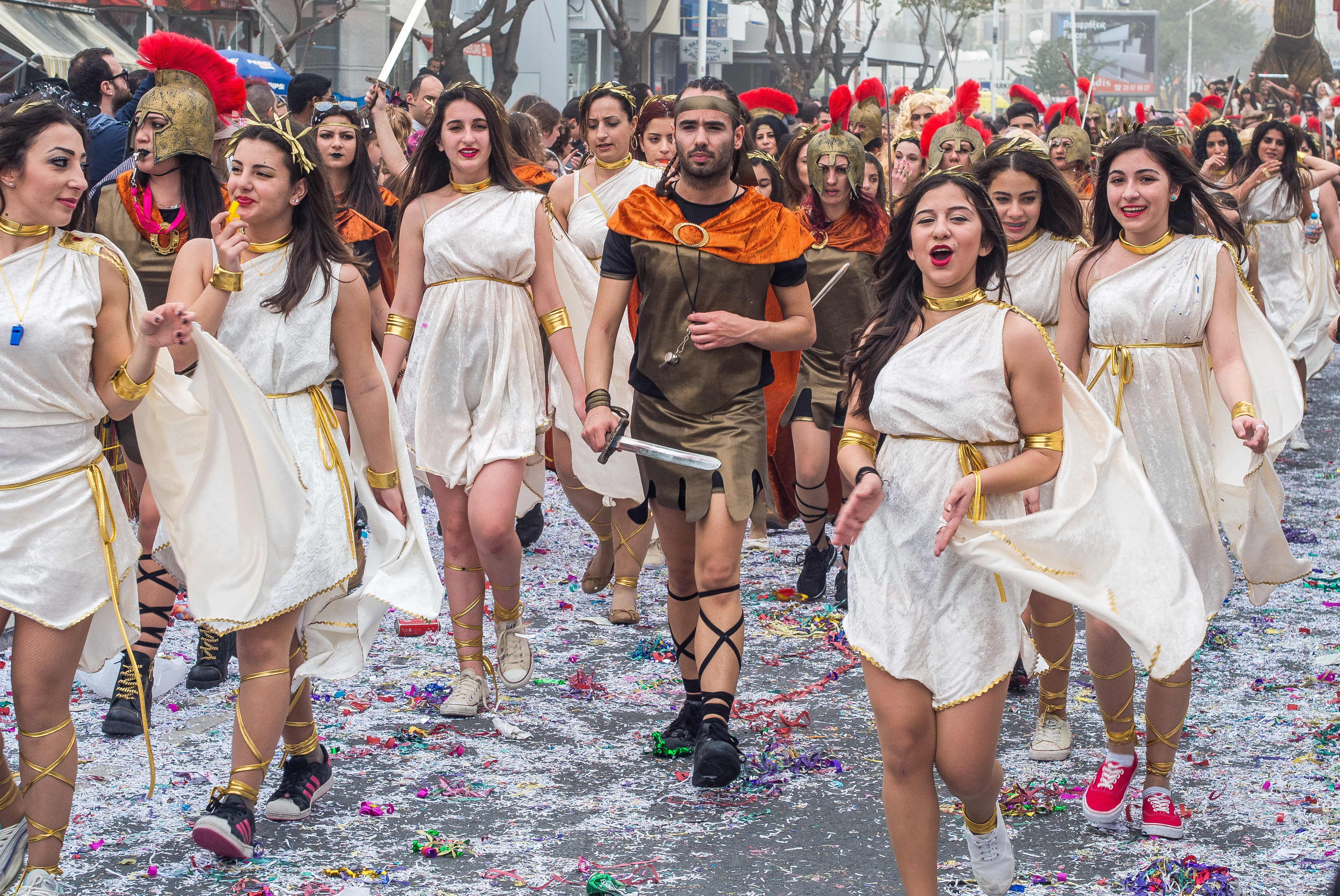 Carnival in Limassol 2014